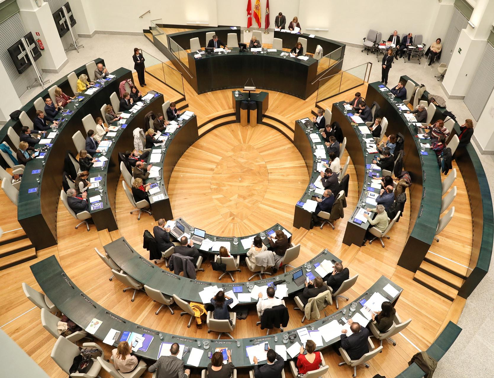 El Pleno del Ayuntamiento de Madrid ha aprobado por unanimidad una declaración institucional que muestra el compromiso del consistorio con la accesibilidad. En este sentido la declaración recoge que el próximo lunes 4 de diciembre se izará un estandarte con el símbolo internacional de la accesibilidad, diseñado por Susanne Koefoed en 1968, que representa la Accesibilidad Universal en todo el mundo.